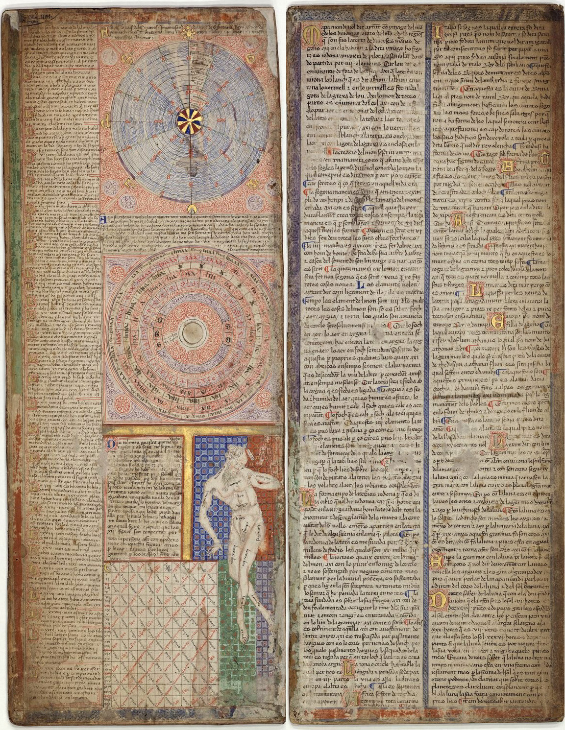 Full 1 de l'Atles Català de Biblioteca Nacional de França